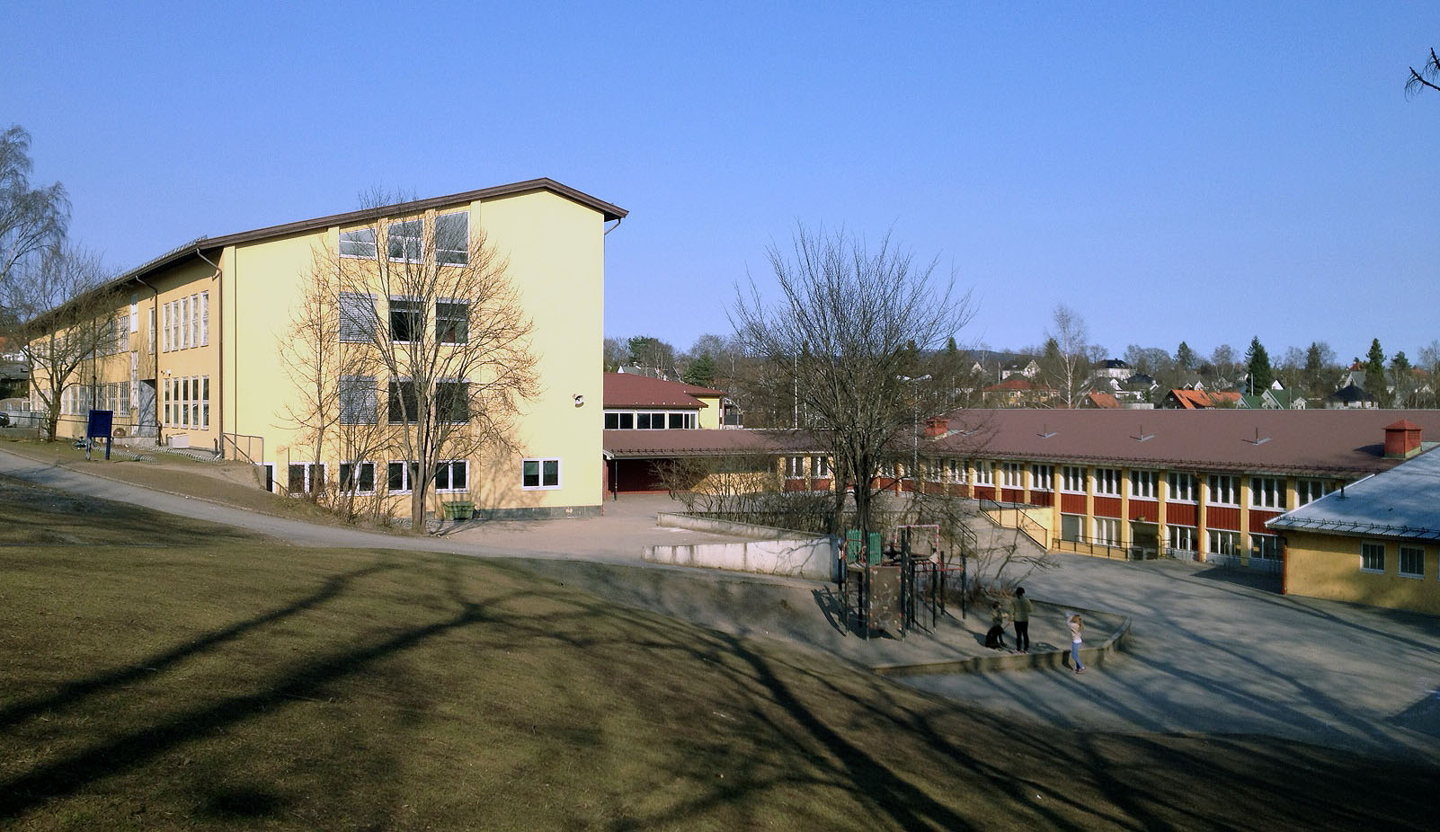 Smestad skole i Oslo